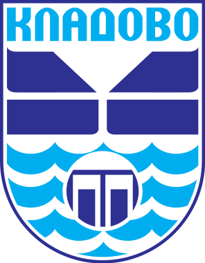 Das Wappen der Stadt und Gemeinde Kladovo